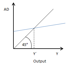 Modrá čára představuje křivku AD